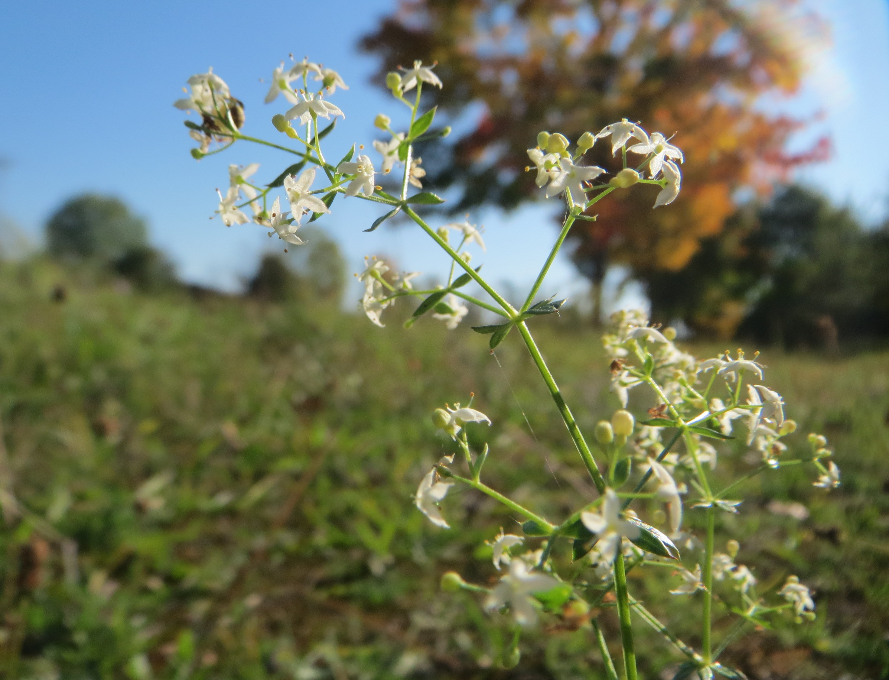 Wiesenlabkraut (Galium mollugo) an einem Randstreifen der B36 bei Hockenheim